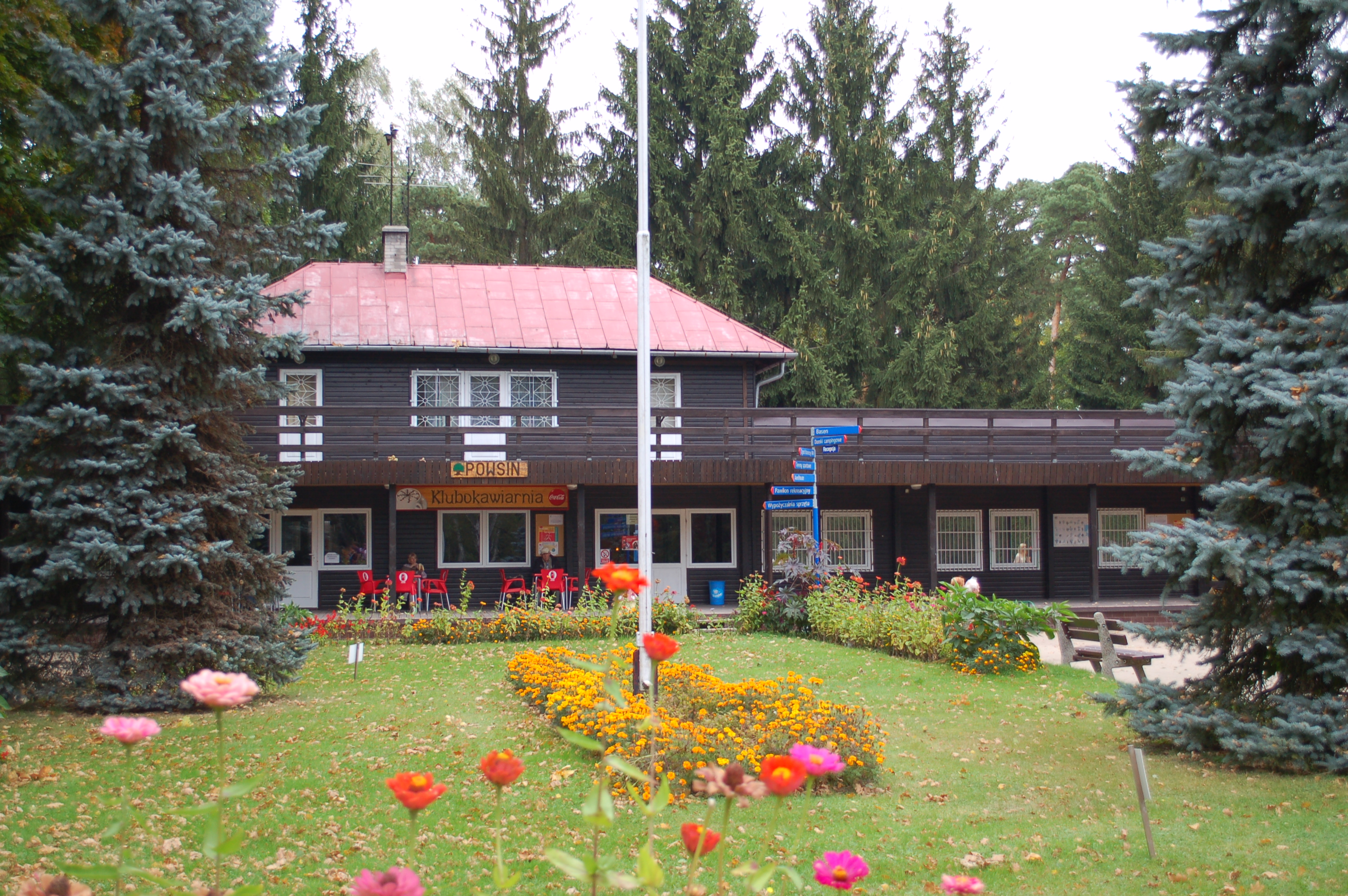 Powsin Park Warsaw, Park administration building